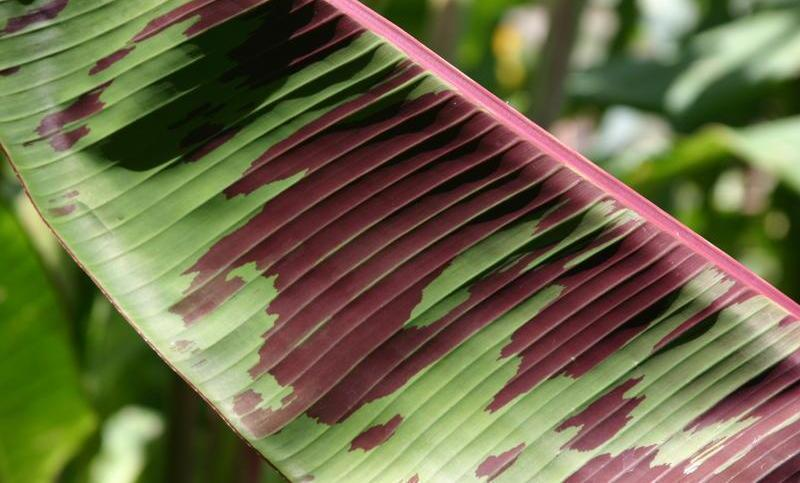 Musa acuminata ssp. zebrina (Syn. Musa sumatrana) Red Banana Tree , or Variegated Blood Banana 'Rojo'.